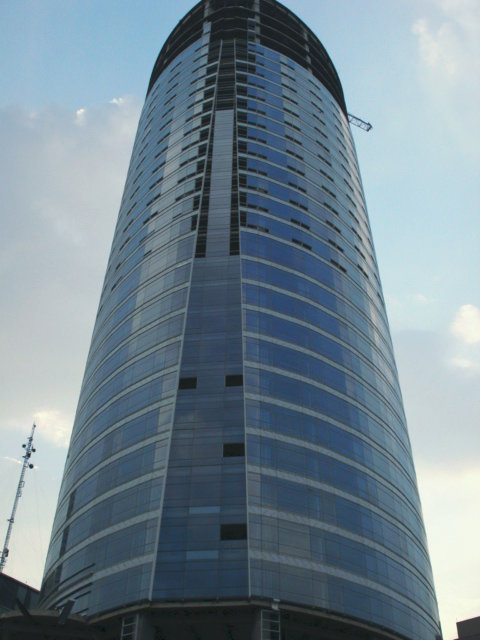 Torre Regis (Libertad) Ciudad de México.